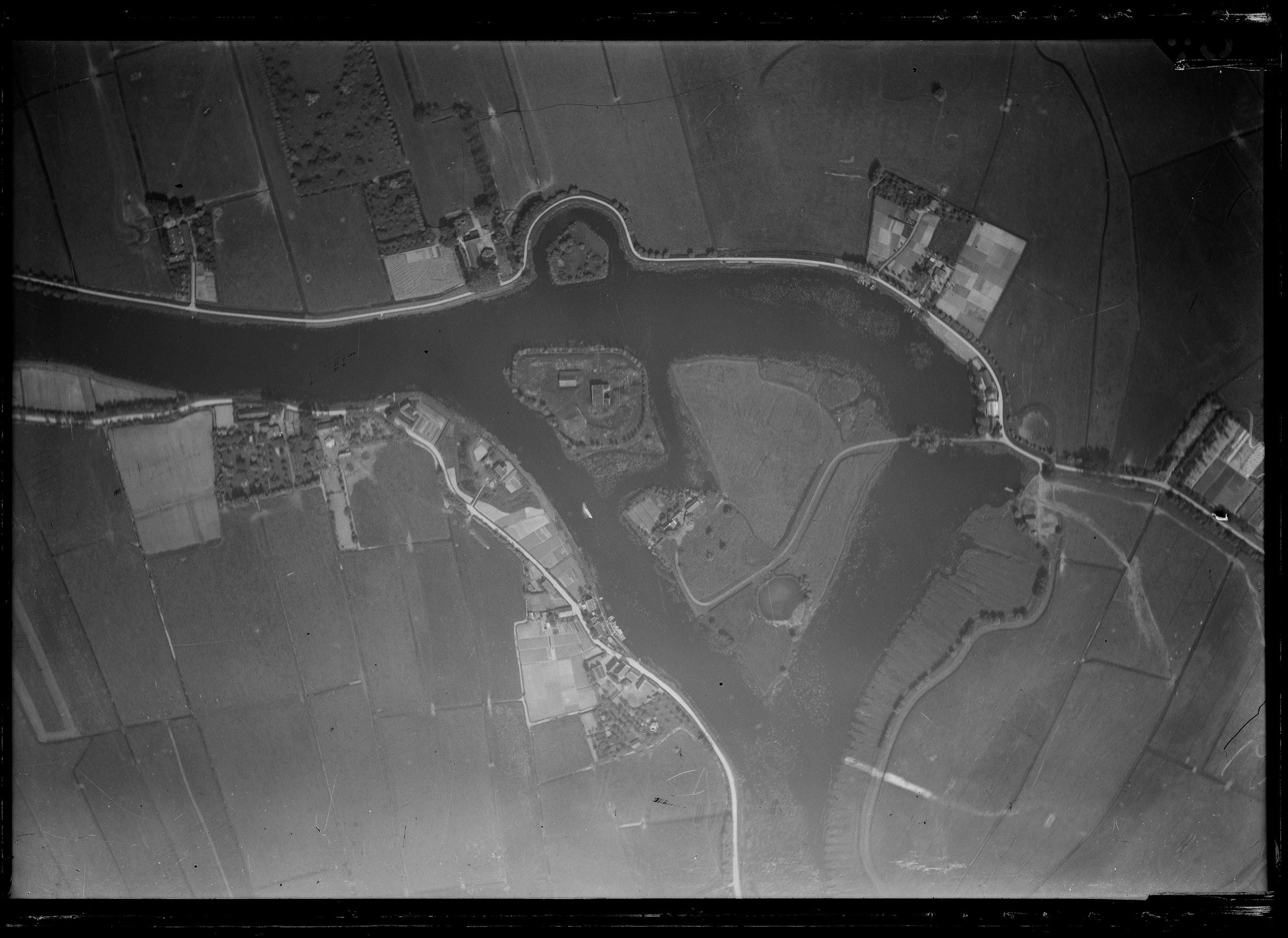 Verticale luchtfoto van Fort Hinderdam.